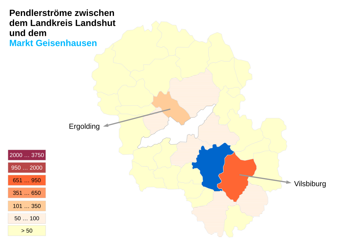 Darstellung der Pendlerströme aus den Gemeinden des Landkreises Landshut in den Markt Geisenhausen und umgekehrt. Das der Graphik zu Grunde liegende Zahlenmaterial datiert vom 30. Juni 2016 und stammt vom Statistik-Service Südost der Bundesagentur für Arbeit. Die Zahlen waren vom Regionalmanagement für Stadt und Landkreis Landshut im "BERICHT ZUM PENDLERAUFKOMMEN IN STADT UND LANDKREIS LANDSHUT" veröffentlicht worden.